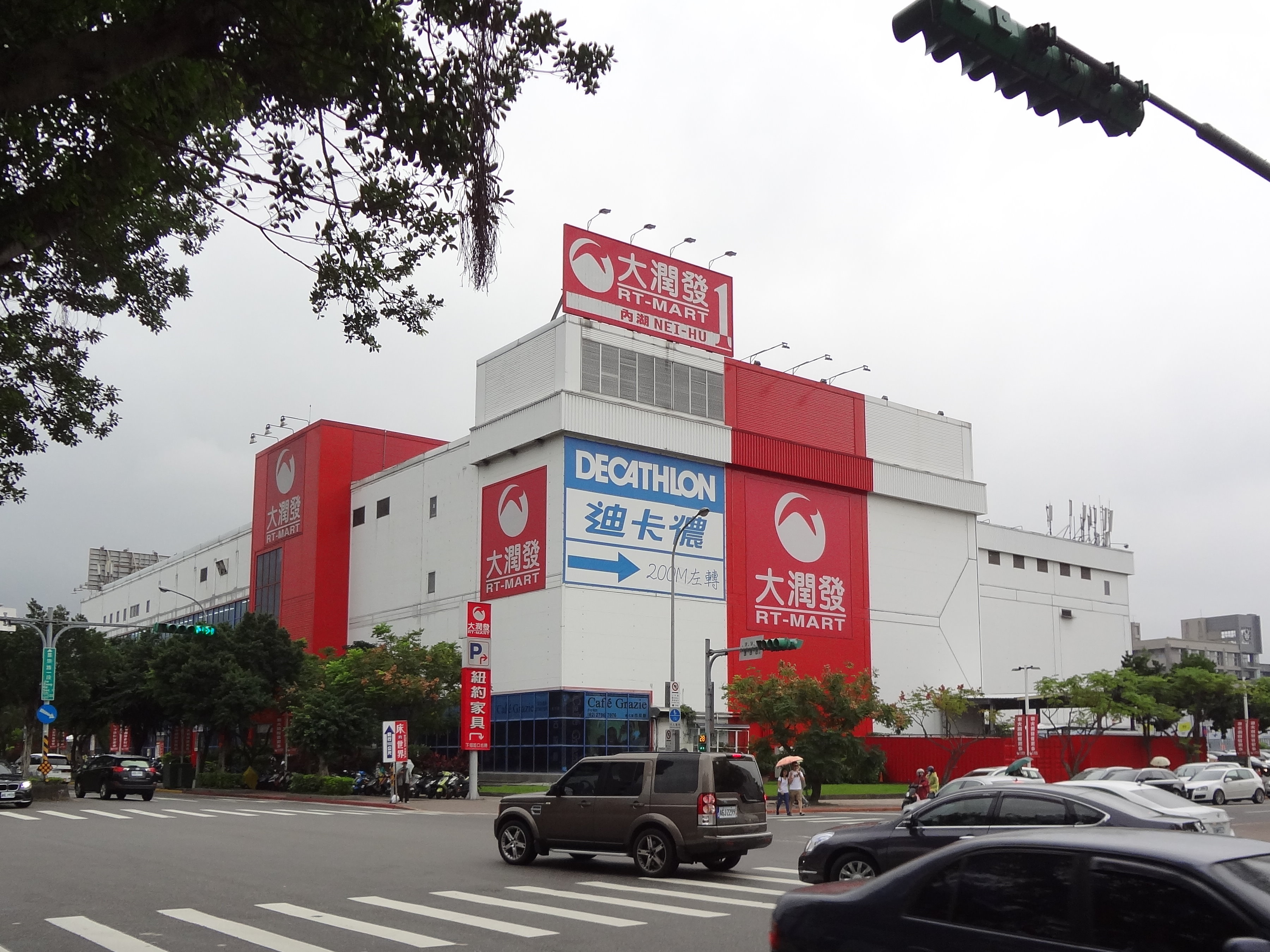 中文（台灣）: 大潤發內湖一店，地址：臺北市內湖區舊宗路一段128號。